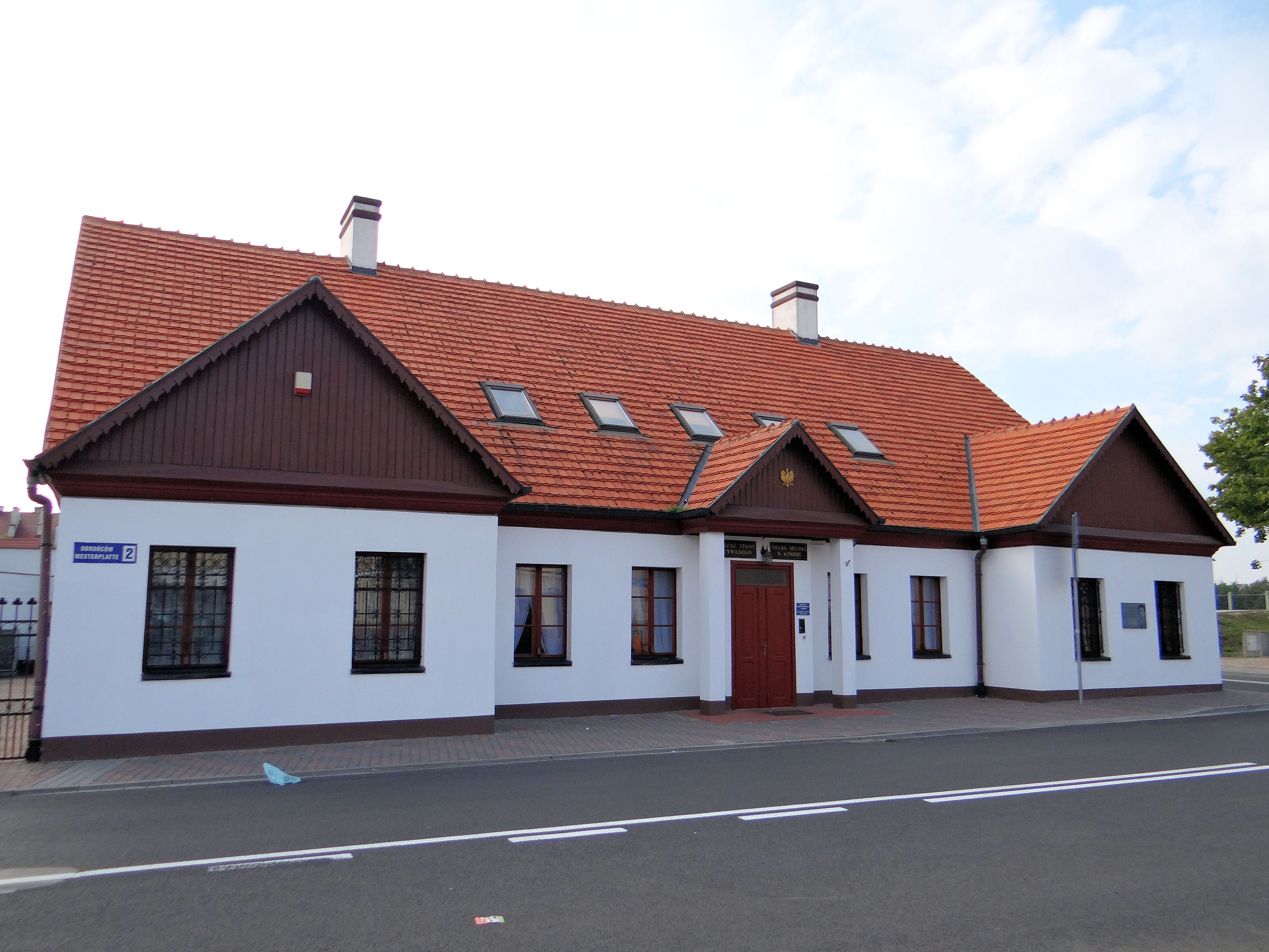 Zabytkowy dworek Zofii Urbanowskiej przy ulicy Obrońców Westerplatte 2 w Koninie